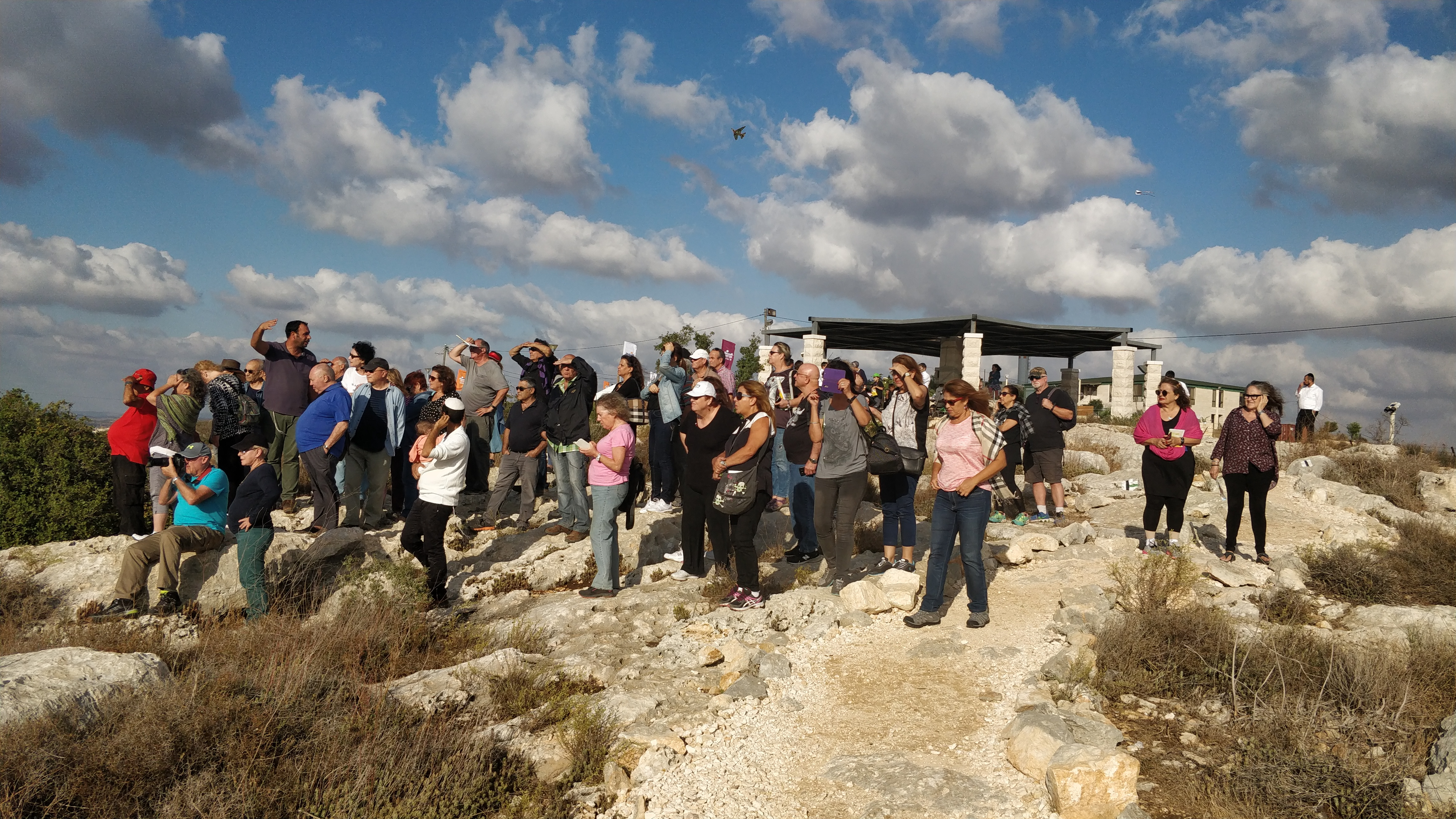 קבוצת מבקרים במרפסת של המדינה במסגרת "פסטיבל המרפסת" בחול המועד סוכות 2017